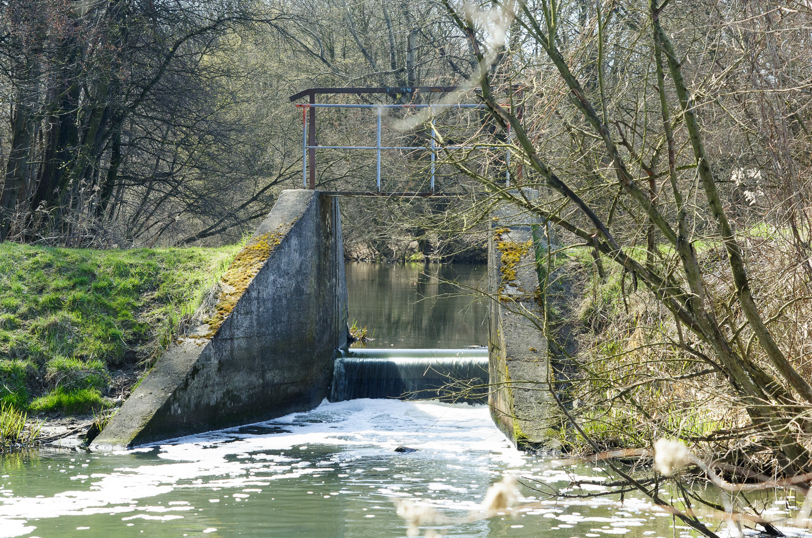 Zastawka w pobliżu ujścia Kanału Sobieskiego do Wilanówki wraz z kontrowersyjną kładką.